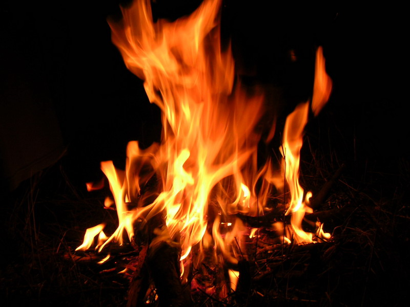 شعله آتش، ساحل دریای خزر، حوالی بندر انزلی، گیلان